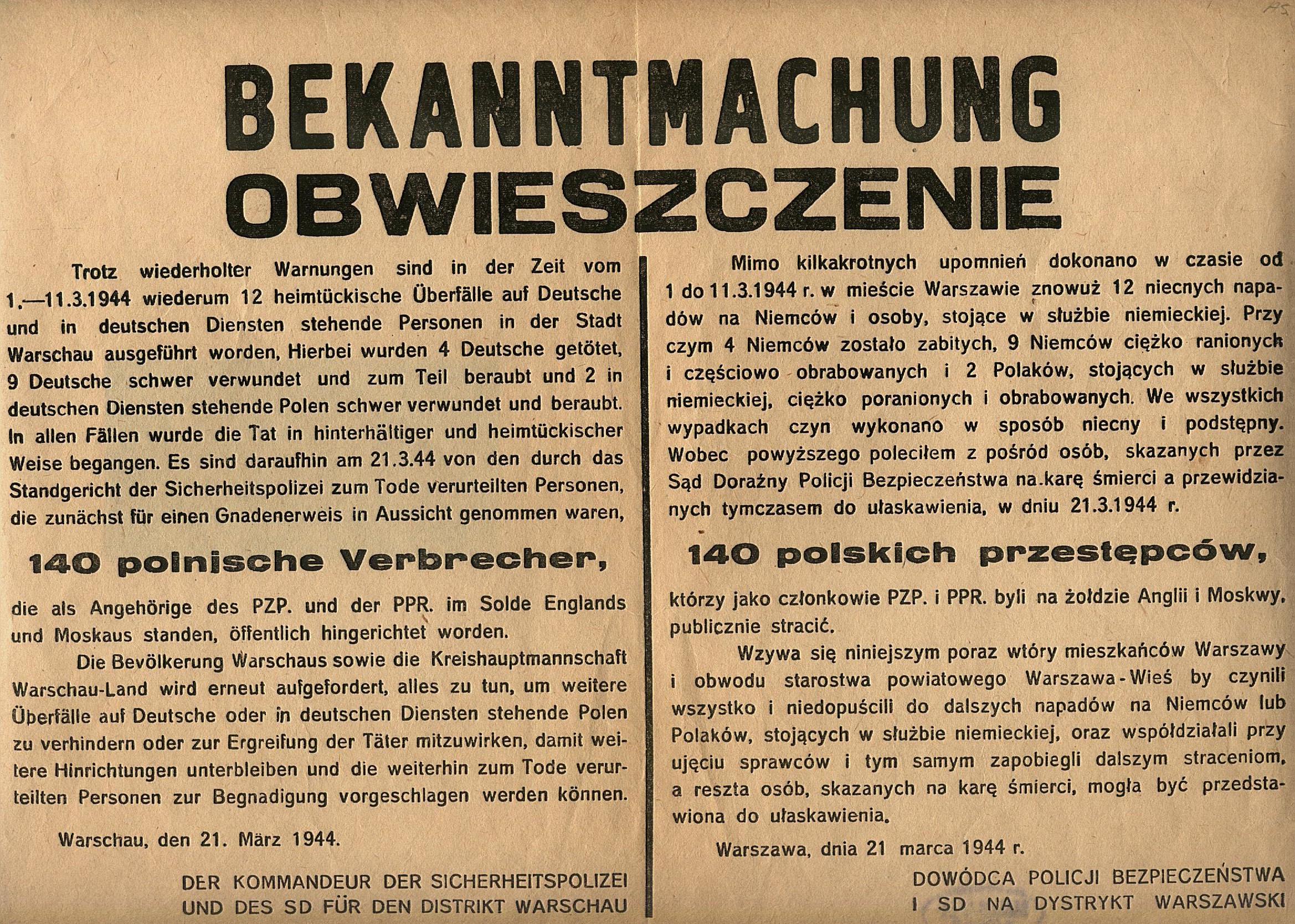 Bekanntmachung